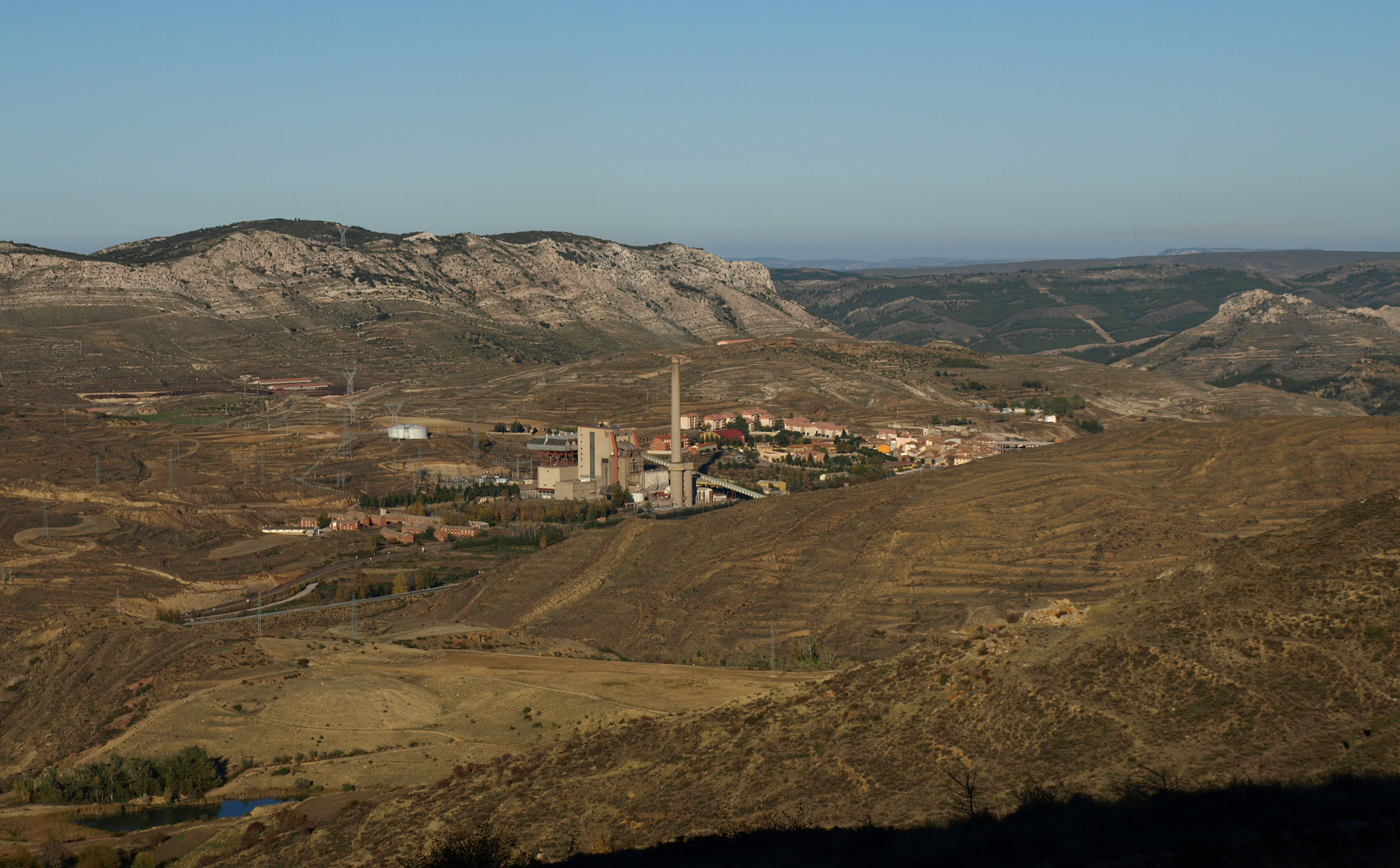 Escucha - Cuencas Mineras - Teruel